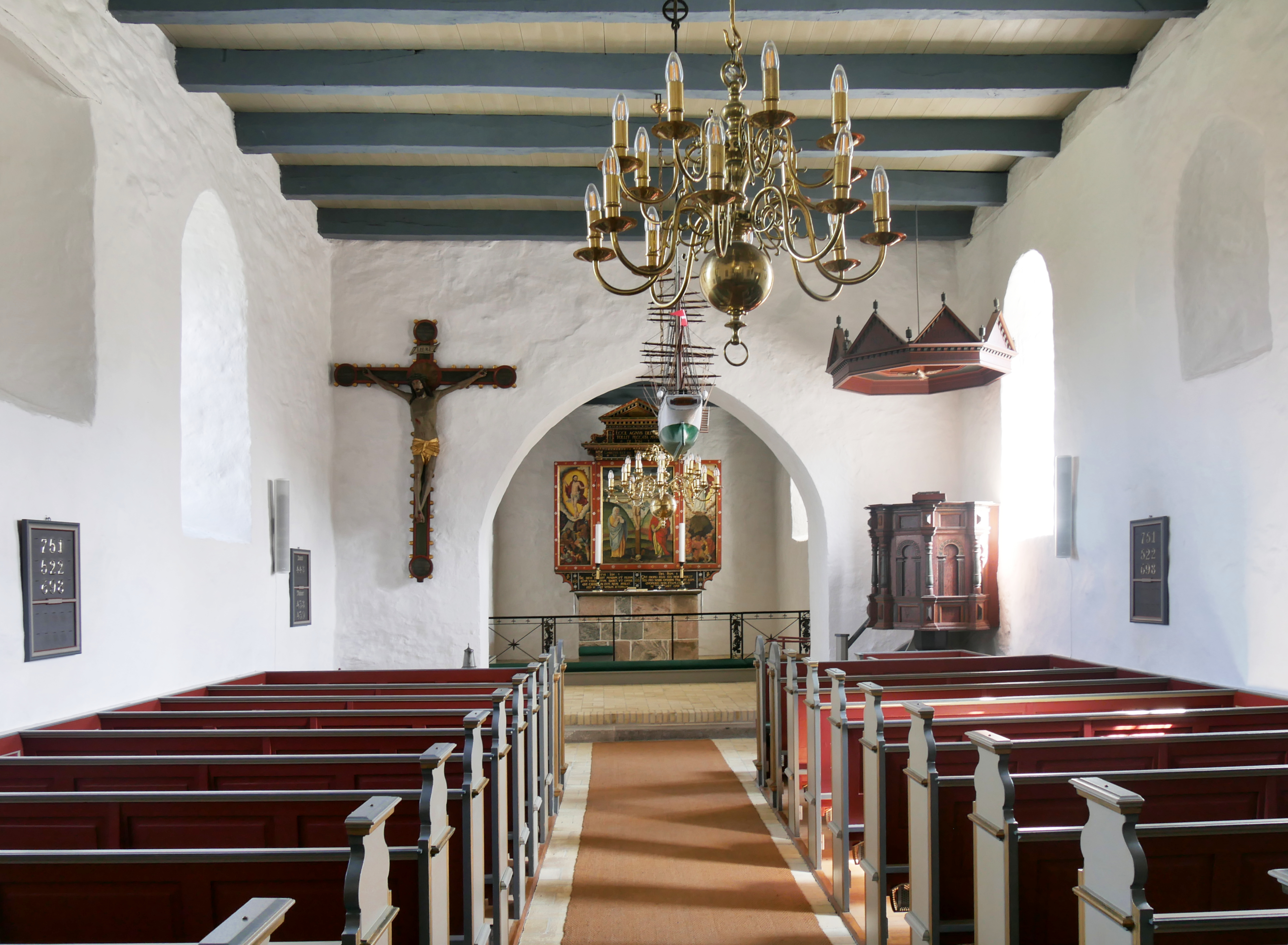 Kirche von Vive am Mariagerfjord (Dänemark, Nord-Jütland)- Erbaut etwa 1250, schöne Innenausstattung: romanischer Taufstein, Renaissacealter, Kanzel aus dem Historismus, moderne Orgel Kirchenschiff